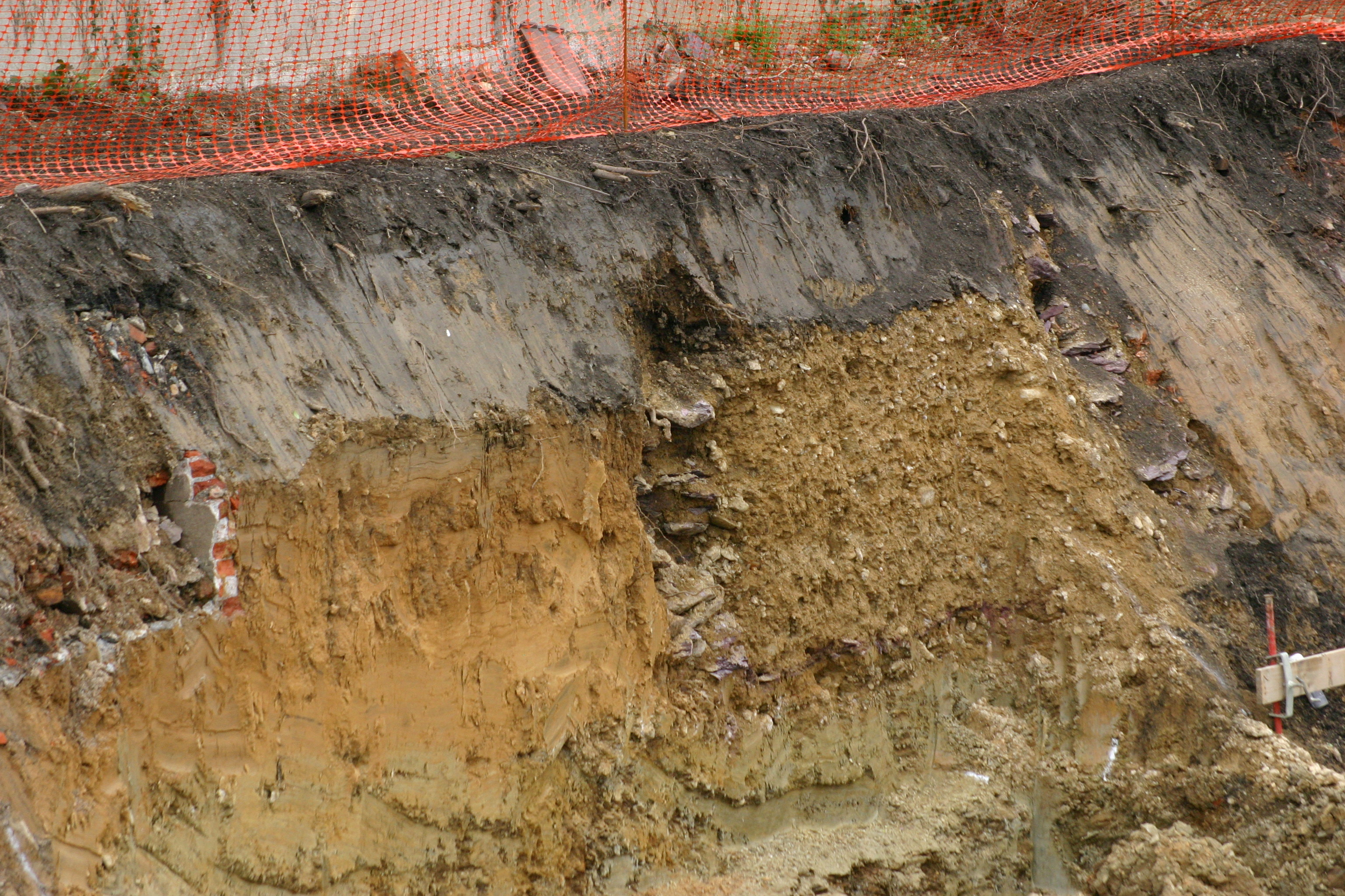 Anthroposol de la région rennaise